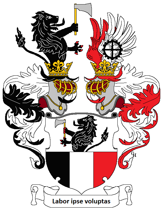 Wappen des Erfinders und Unternehmers Johann Zimmermann (1820–1901), Begründers des Werkzeugmaschinenbaus in Deutschland, verliehen anlässlich seiner Erhebung in den österreichischen Ritterstand 1877. Zeichnung von Gerd Hruška (